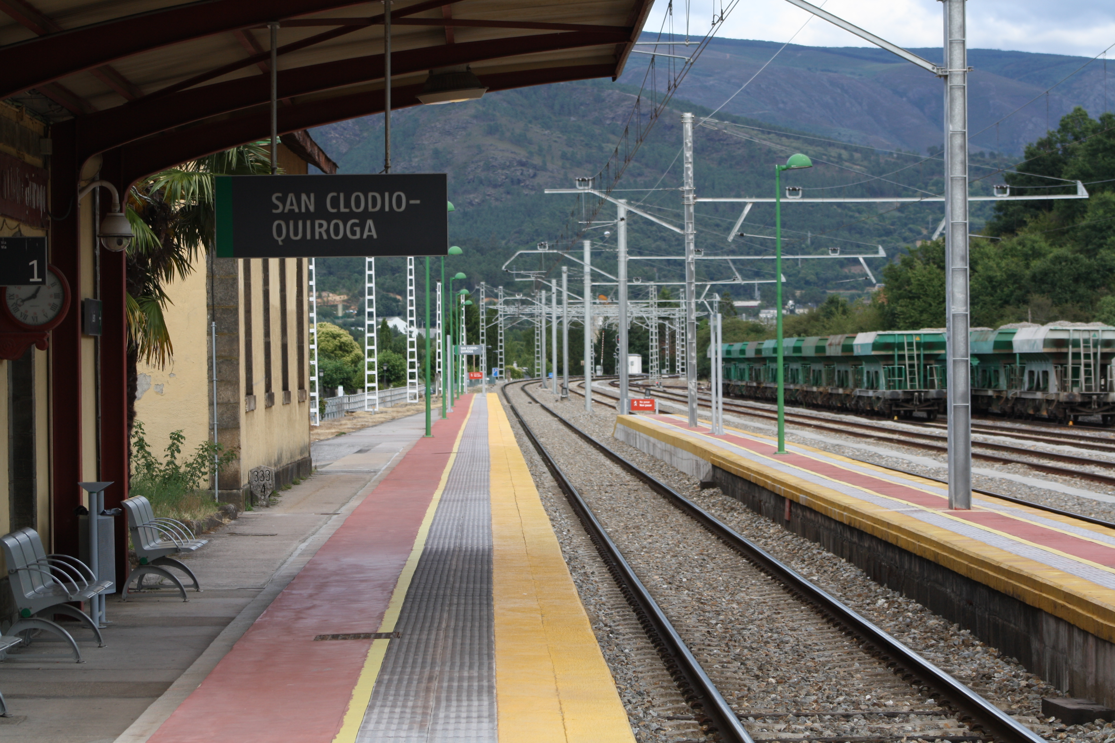 Estación de ferrocarril de San Clodio - Quiroga. Concello de Ribas de Sil. (provincia de Lugo)